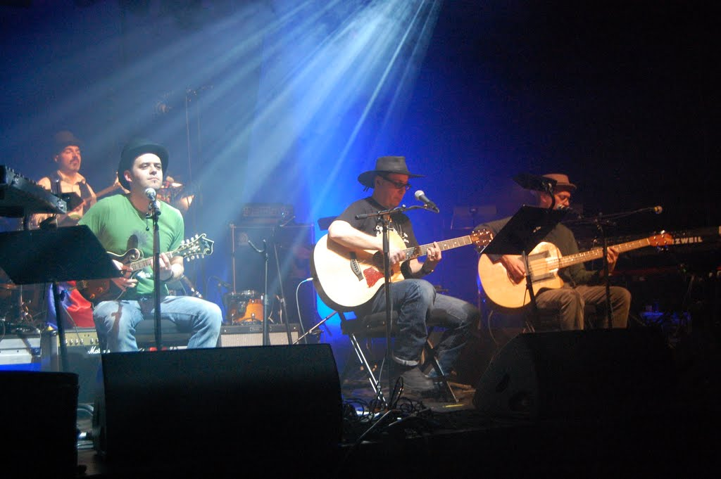 Caballero Reynaldo & The Grand Kazoo en el Yellow Snow Festival deLarvik, Noruega, en 2011.